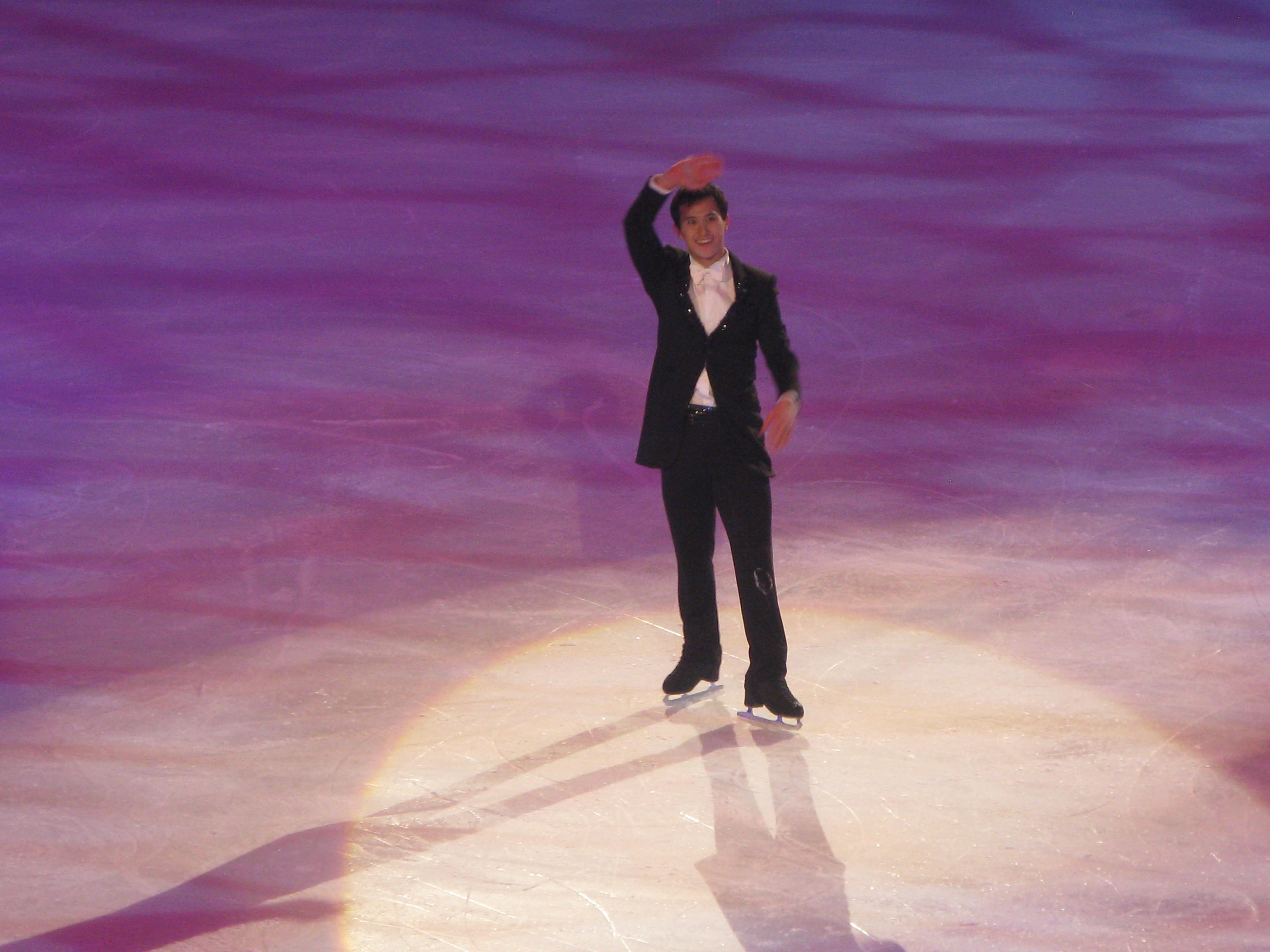 Patrick Chan lors du gala du trophée Éric Bompard 2013 à Paris-Bercy.